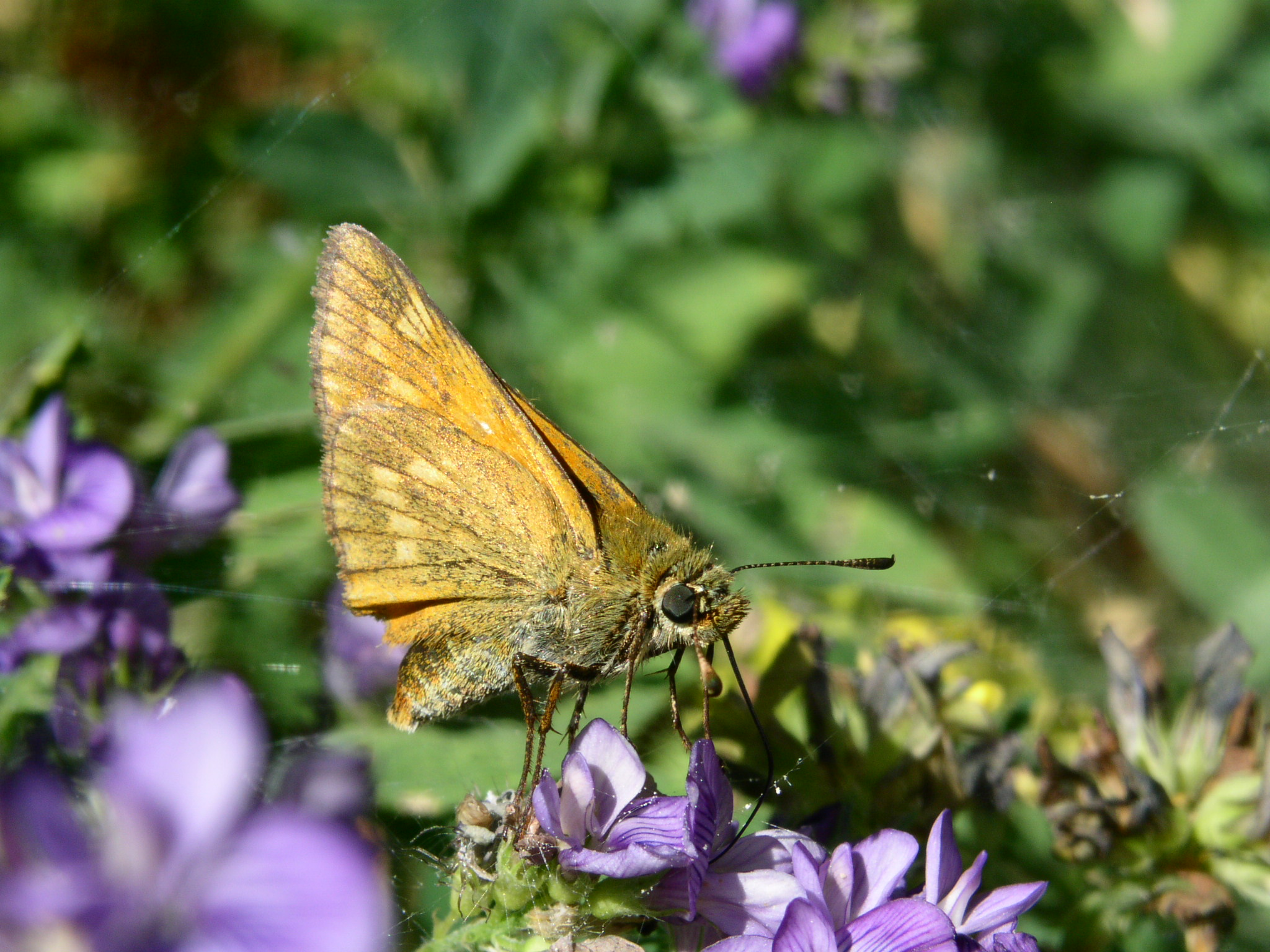 Ochlodes sylvanus (Ängssmygare). Gärdslösa Öland, Sweden